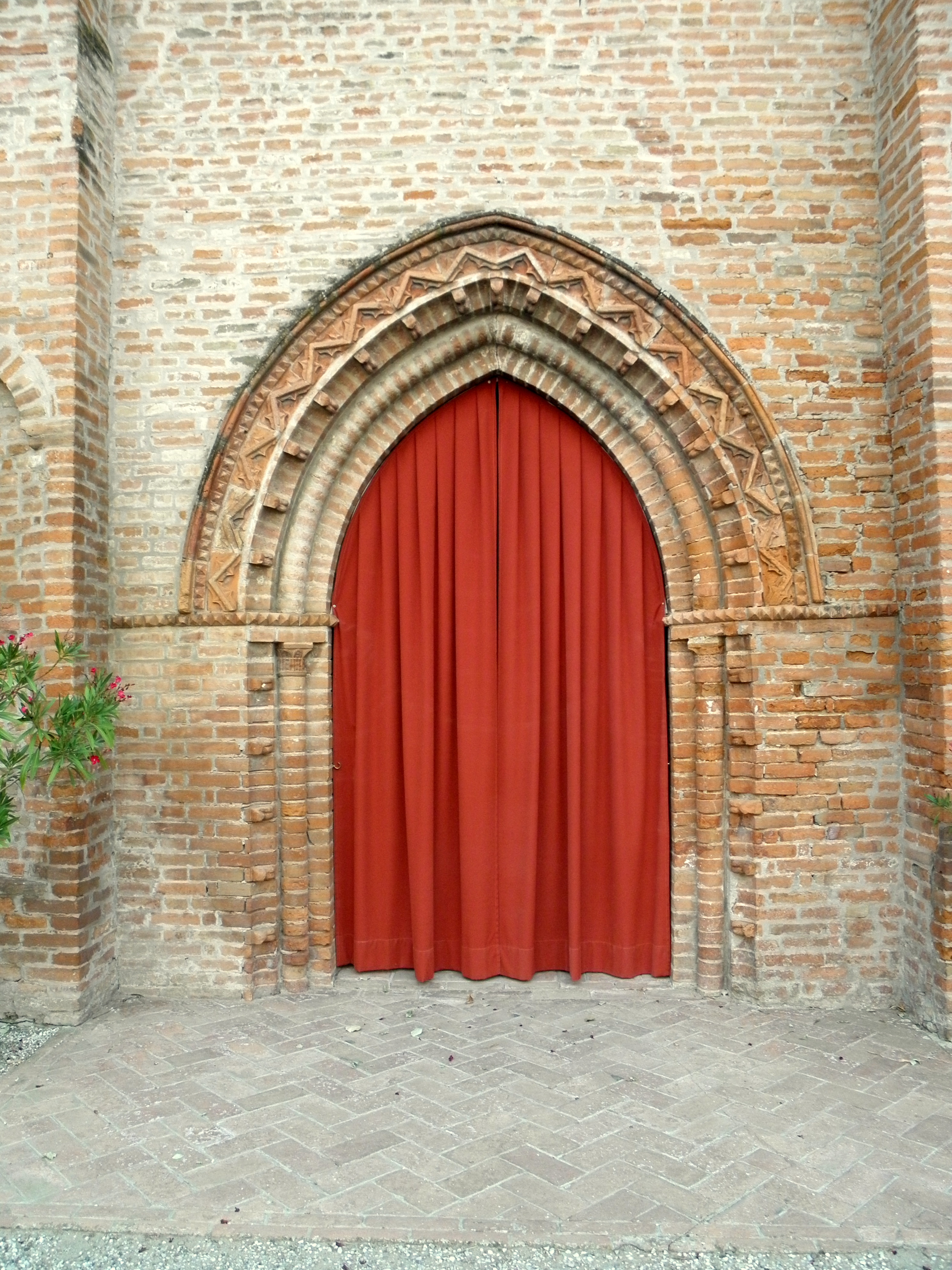 Felonica, gà comune autonomo e ora frazione del comune sparso di Sermide e Felonica: la chiesa romanica di Santa Maria Assunta, addossata alla sponda sinistra del fiume Po.